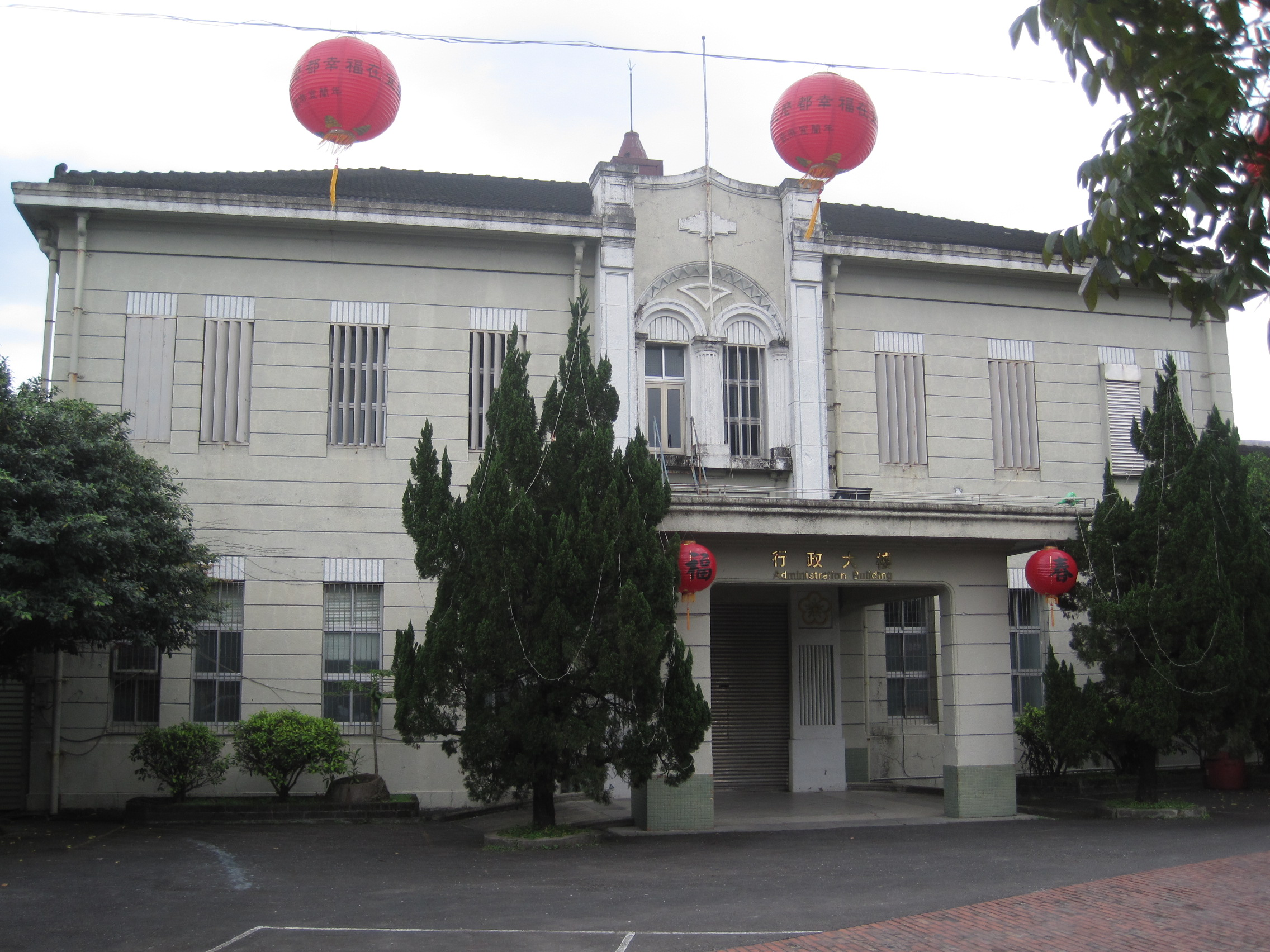 宜蘭舊酒廠行政大樓，原為臺灣總督府專賣局宜蘭支局廳舍